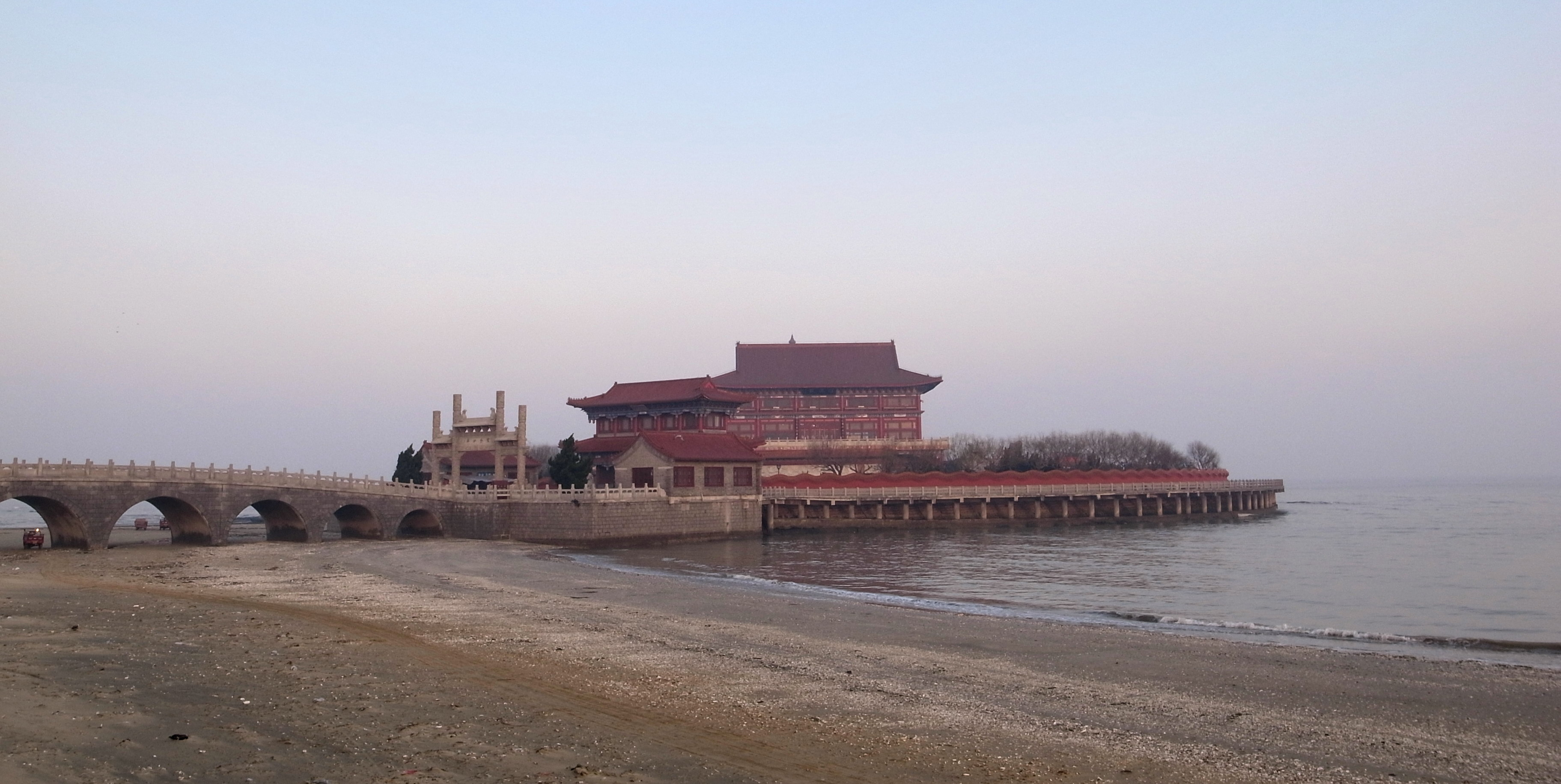 Penglai, Yantai, Shandong, China